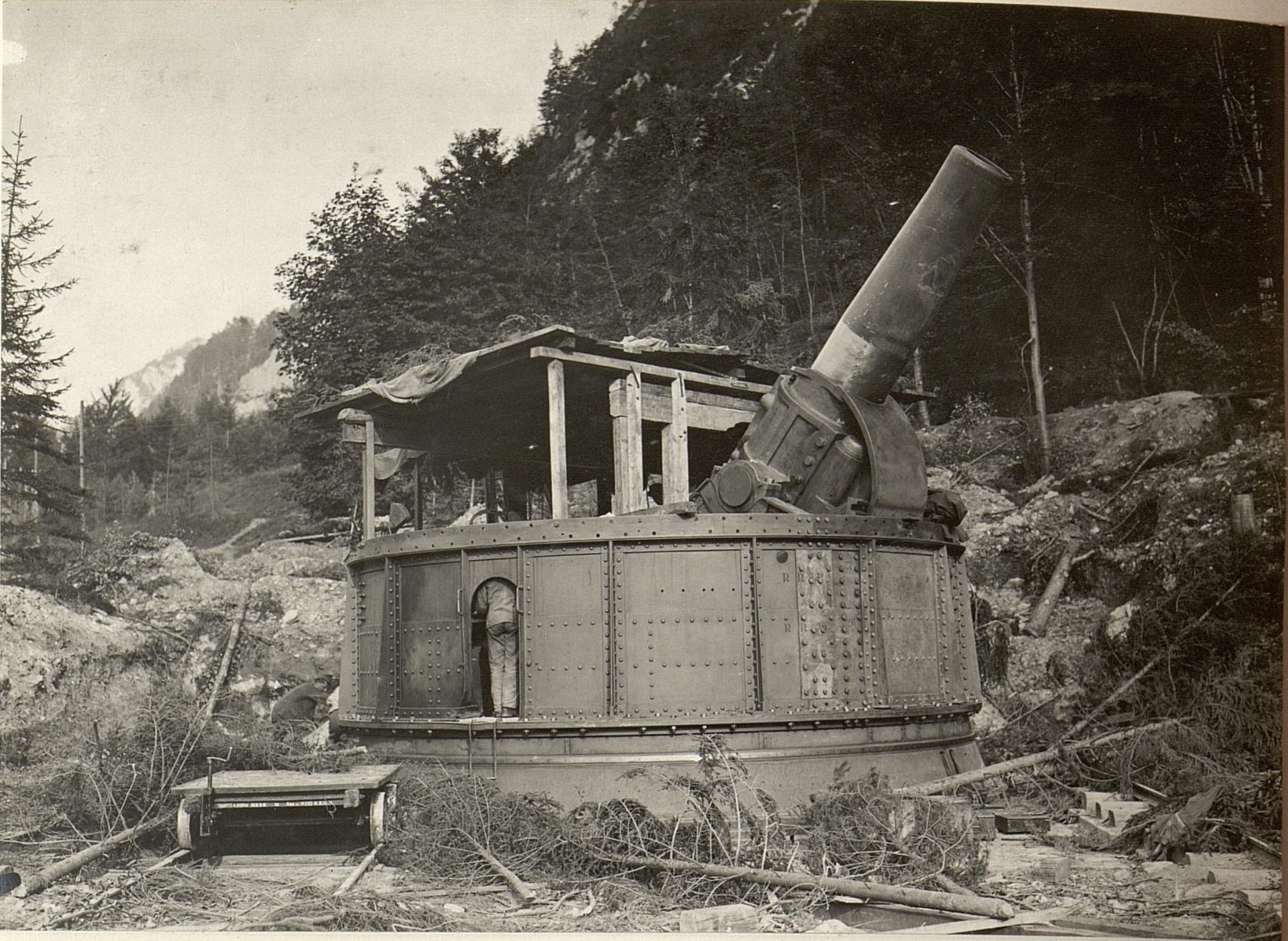 42 cm Haubitzen Stellung im Canaltal bei GUGG. Geschütz Feuerbereit.